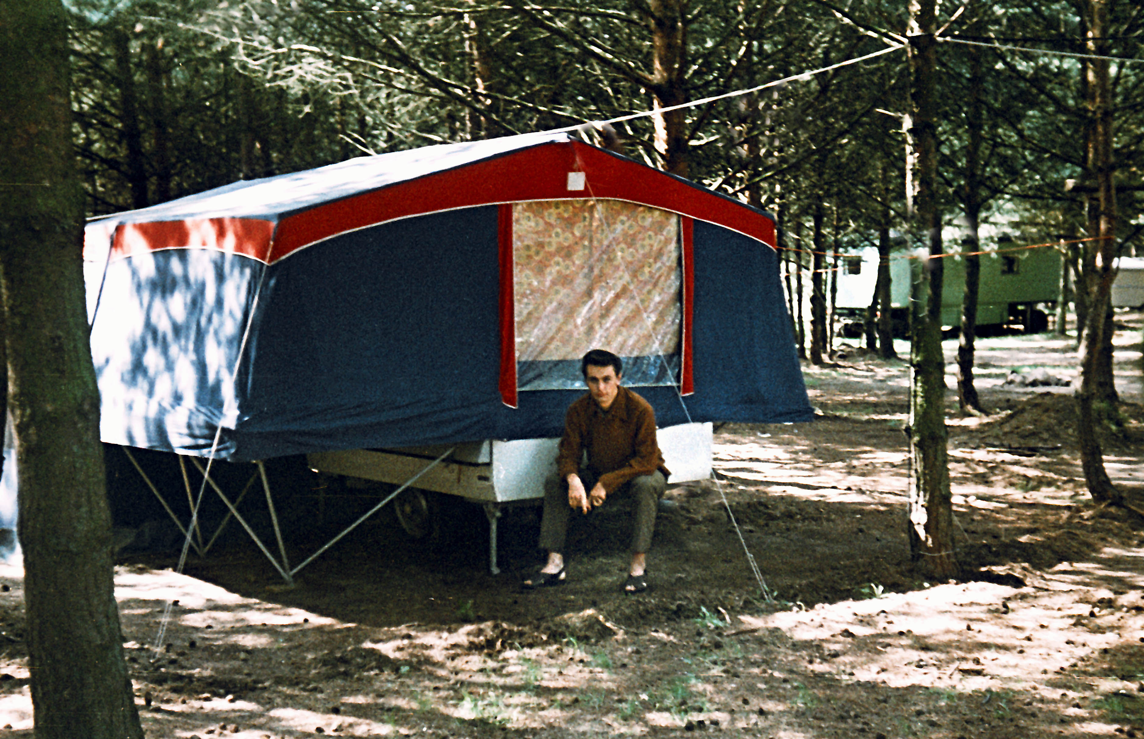 22.08.1972 DDR 2221 [17440] Zeltplatz Lütow (GMP: 54.011400,13.859081) Post Neuendorf am Achterwasser (Insel Usedom, Ostsee): Klappfix-Campinganhänger, gebaut im VEB Fahrzeugwerk Olbernhau. Urlaubsplatz der ZBE Agrobau Dresden. Hier aufgebaut. Der Autoanhänger ist aufgeklappt mit Betten und Küchenzeile. [F19720822A008.JPG]19720822120NR.JPG(c)Blobelt